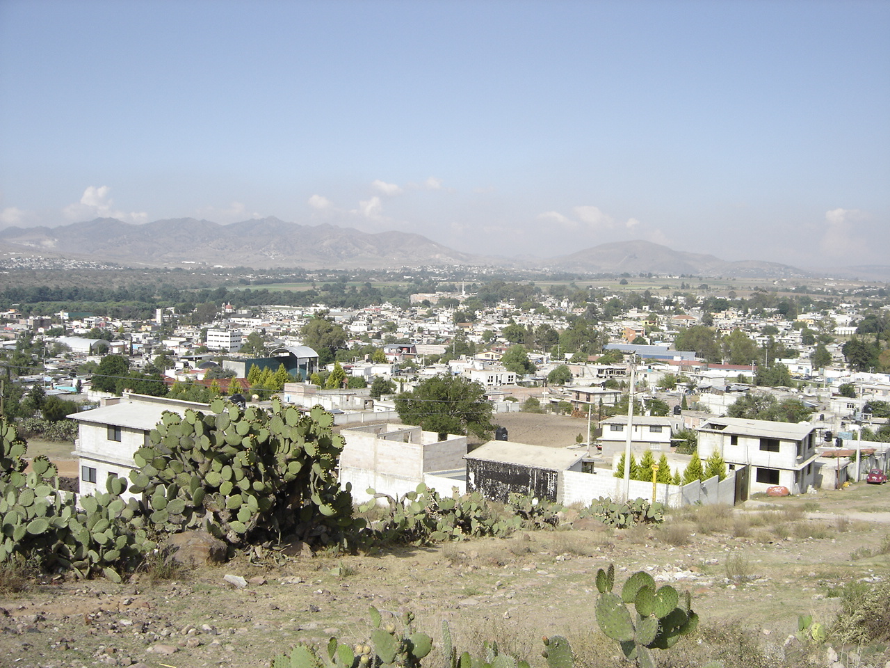 Vista Panoramica del Municipio de Santiago Tulantepec Estado de Hidalgo, México